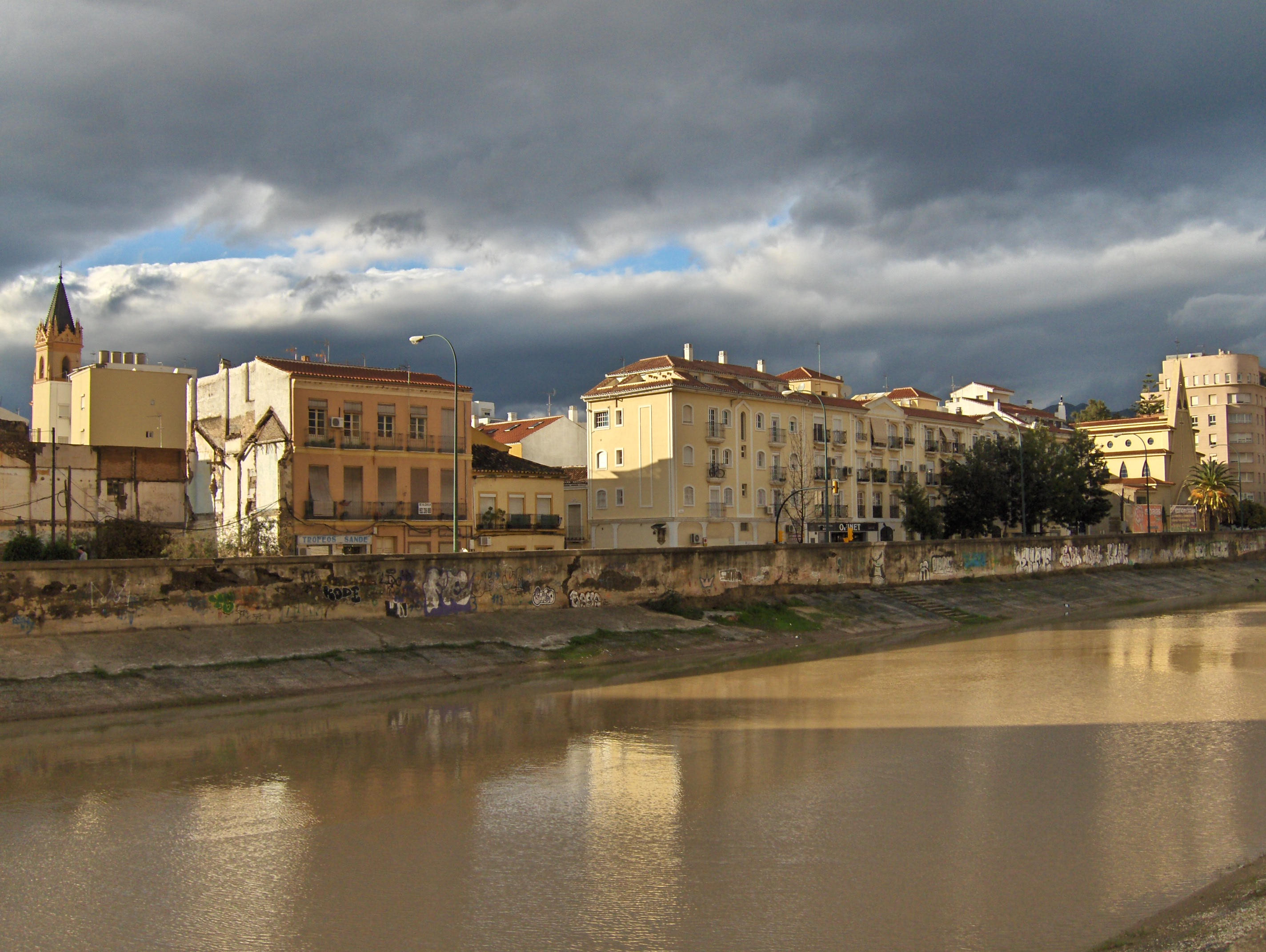 Frente fluvial del barrio de la Trinidad, Málaga, España.